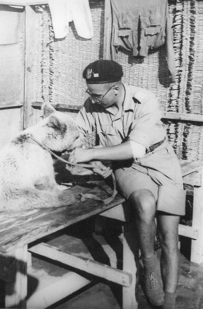 El pequeño oso Wojtek recogido por Piotr Maćkwiak.